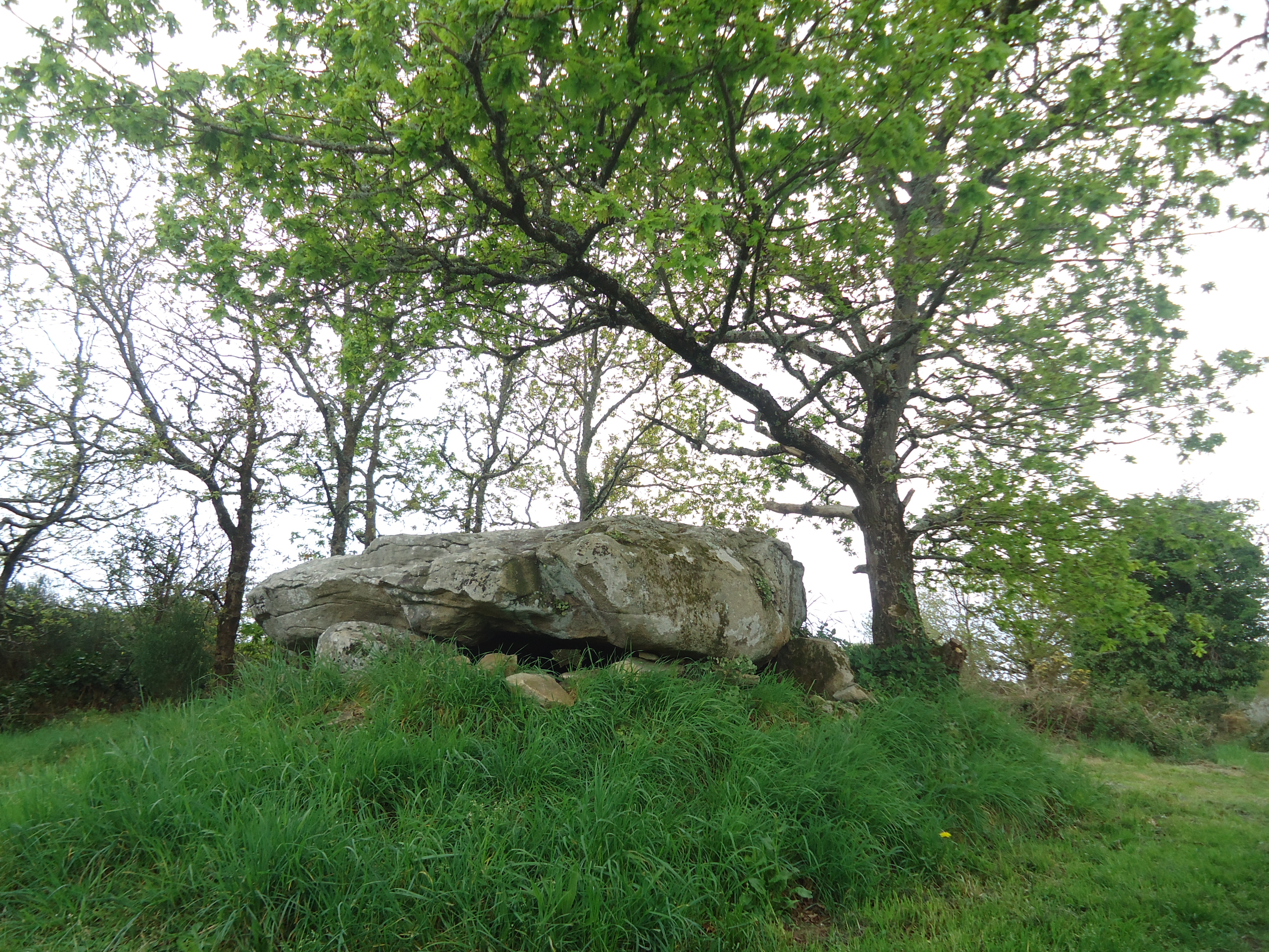 Dolmen de Kerlutu à Belz